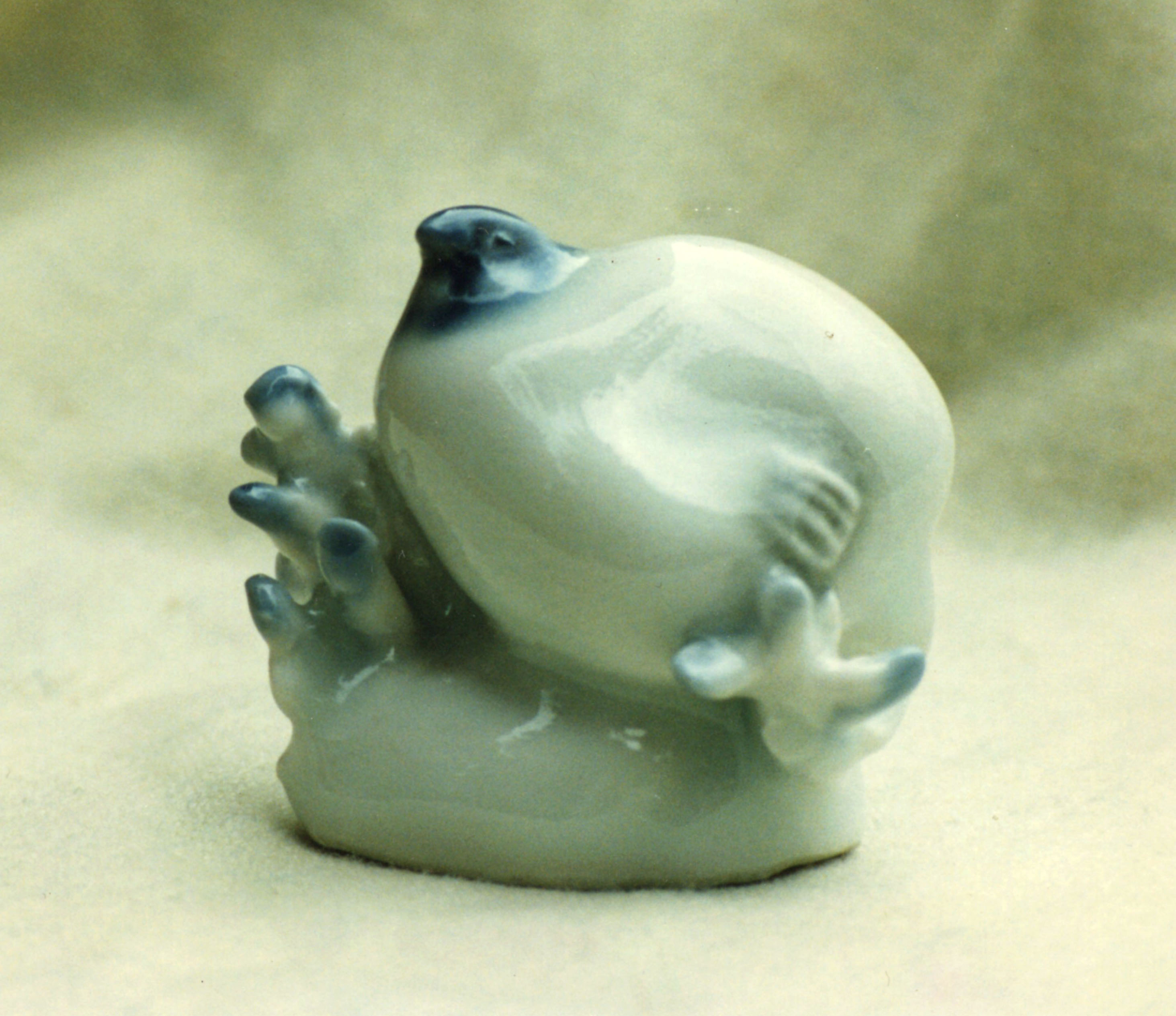 Работа скульптора-художника Николаева Е.В.